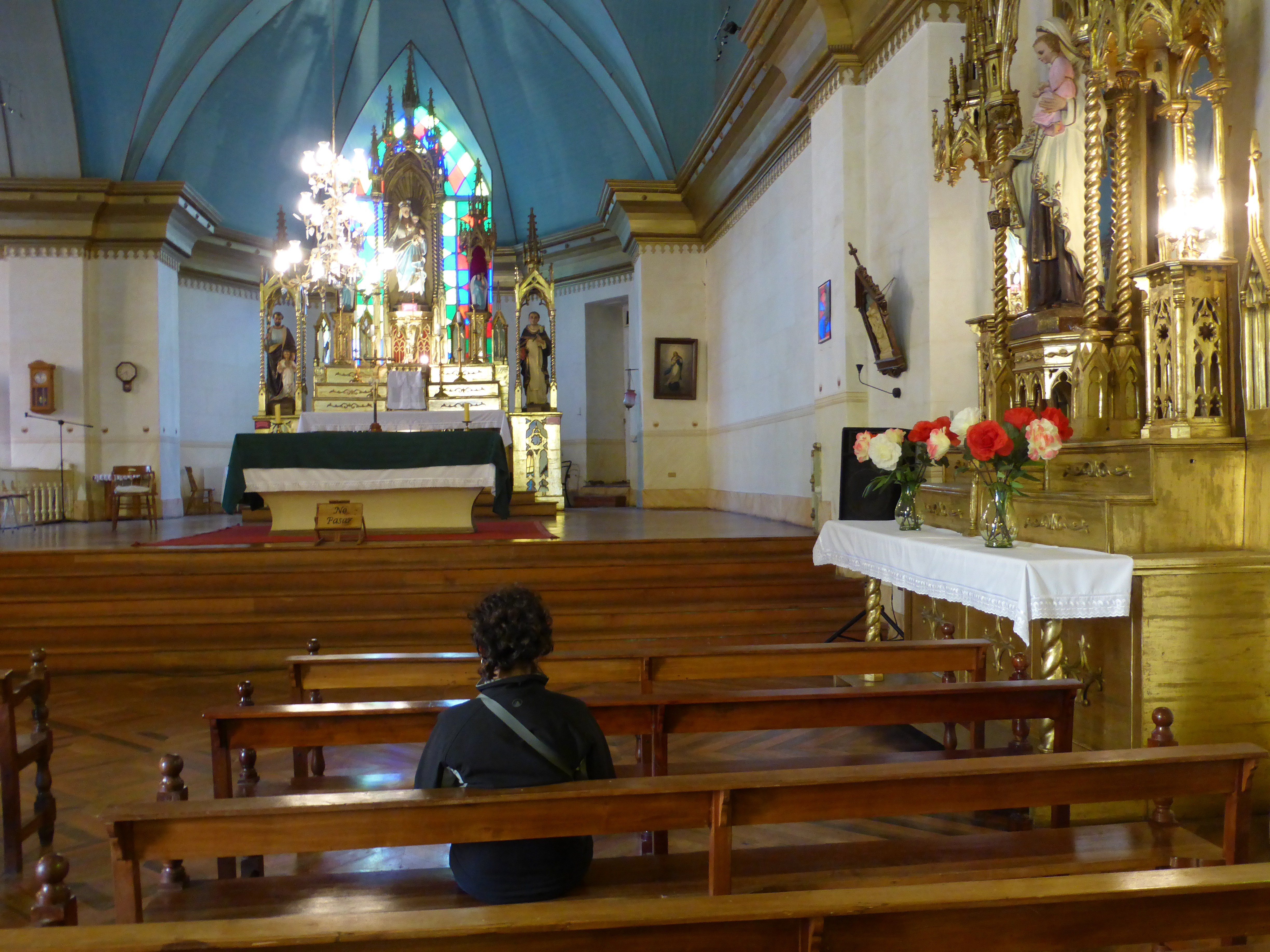 Interior de la iglesia "Nuestra Señora del Rosario", de Pisco Elqui. Es de estilo neogótico, con arcos ojivales. Los altares son fundamentalmente neogóticos, aunque con detalles eclécticos y barrocos (ejemplo, las columnas retorcidas borrominescas).